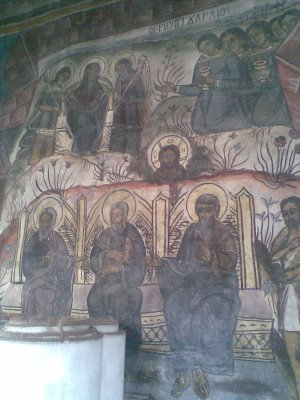 Secțiune din catastihul Bisericii "Sf. Nicolae" din orașul Breaza, Prahova